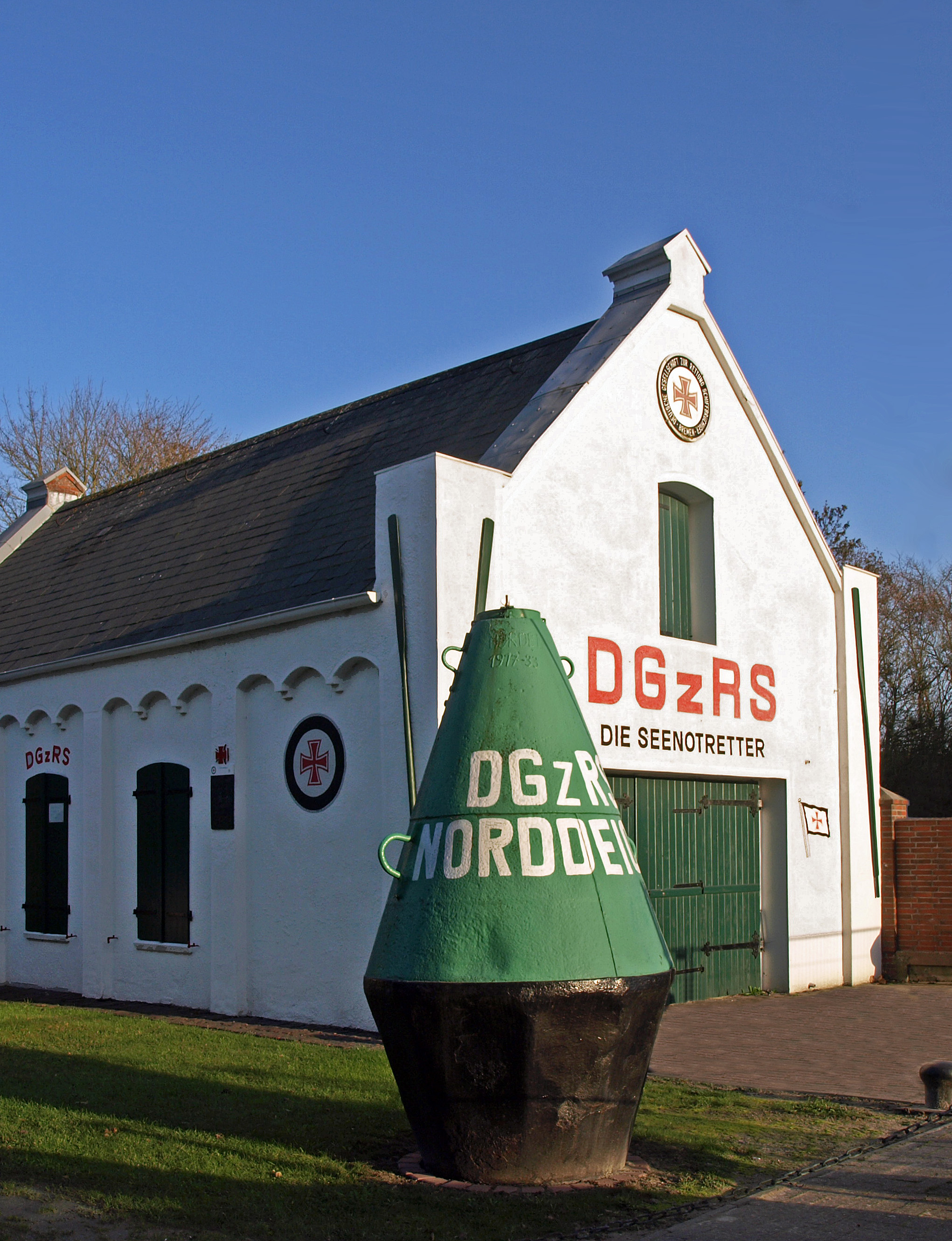 ehem. Rettungsbootschuppen der DGzRS in Norddeich